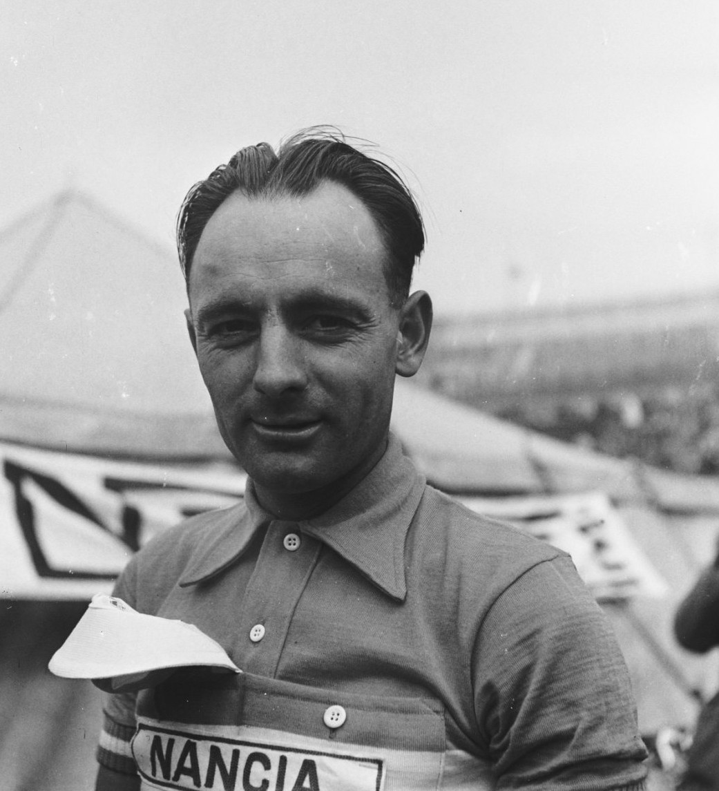 Portretten deelnemers Tour de France , Bauvin (Noord Oost-Frankrijk )